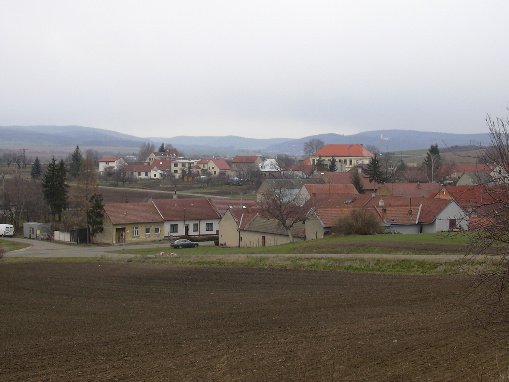 celkový pohled Podbřežice (Vyškov- Czech republic)